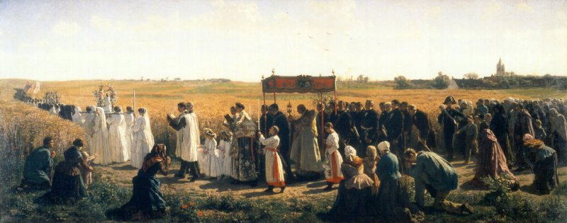 Er rusten geen rechten meer op deze afbeelding in verband met verjaring.